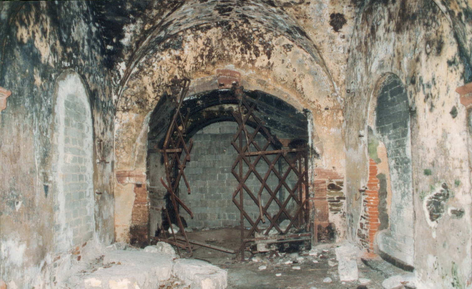 Fort Großfürst Konstantin in Koblenz, Toranlage oder Poterne nach Brand und Zerstörung des Holztores. Ansicht von Innenhof aus.